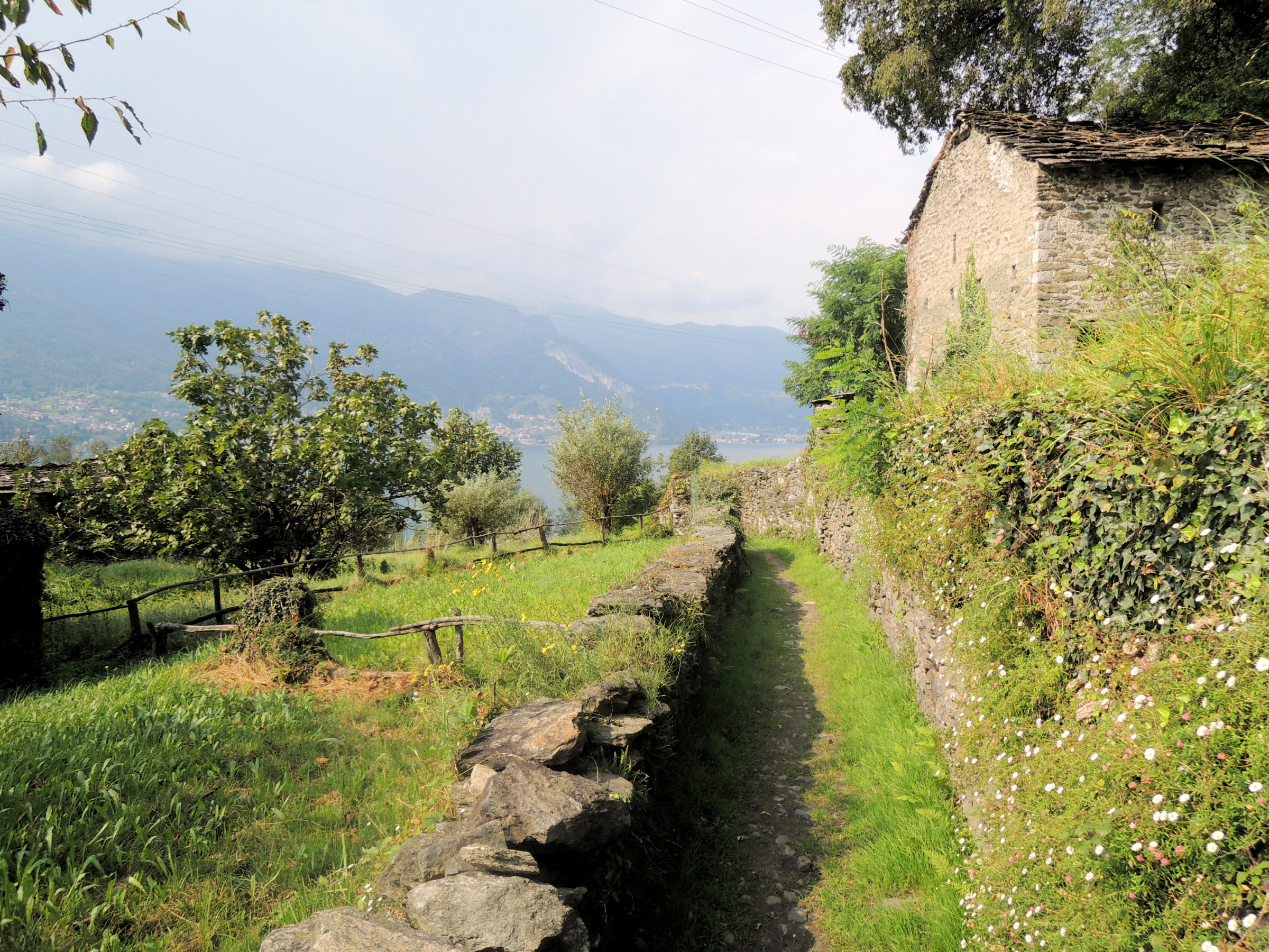 Sentiero del Viandante a Corenno Plinio, frazione di Dervio (LC), Italia